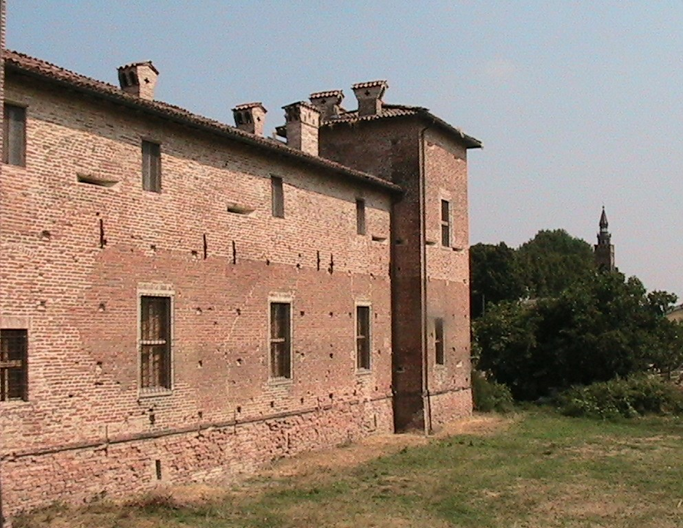 Polesine Parmense - Antica Corte Pallavicina - Castello